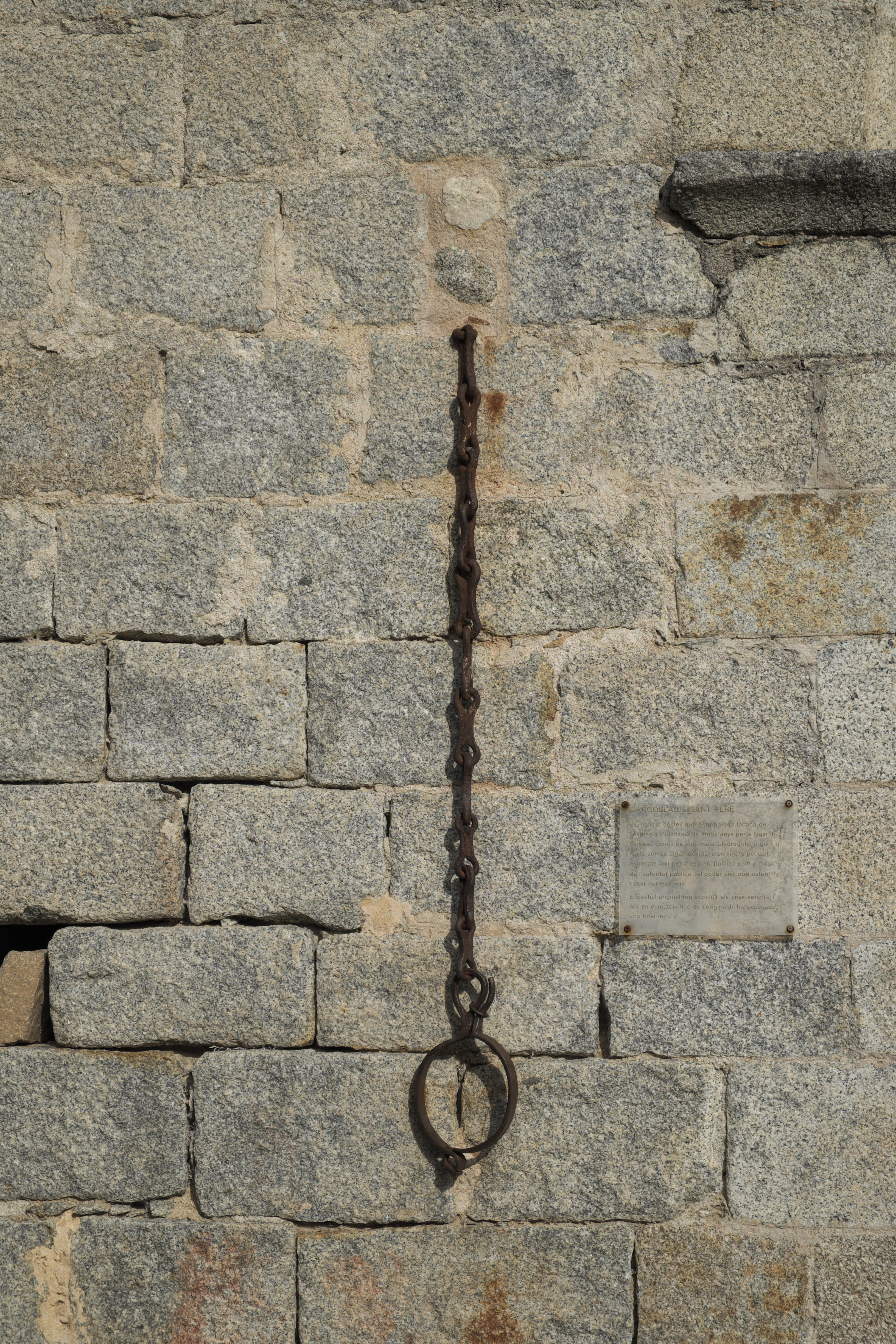 Ehemalige Klosterkirche Sant Pere Cercada in Santa Coloma de Farners in der Provinz Girona (Katalonien/Spanien), Pranger